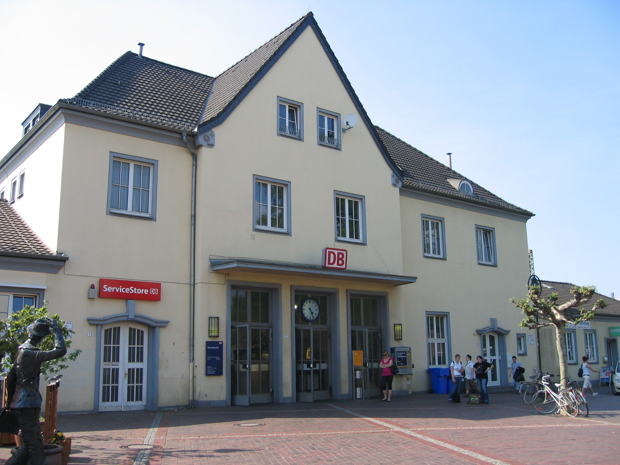 Bahnhof in Grevenbroich (Zugang Bahnhofsvorplatz), links am Rand ist noch eine Skulptur zu sehen, die im Volksmund als "Der letzte Beamte verlässt Grevenbroich" betitelt wird.